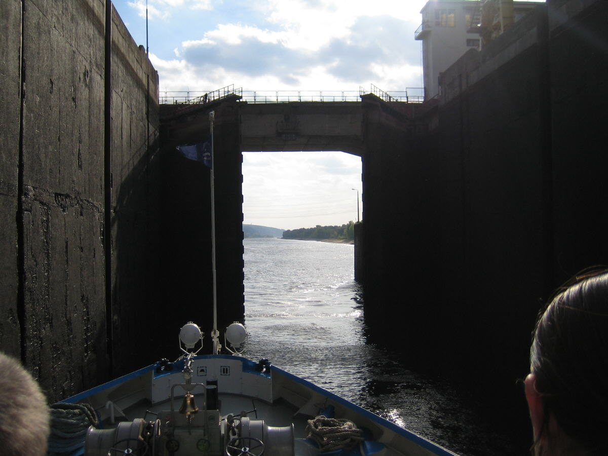 Чайковский, шлюз (08.09.05)